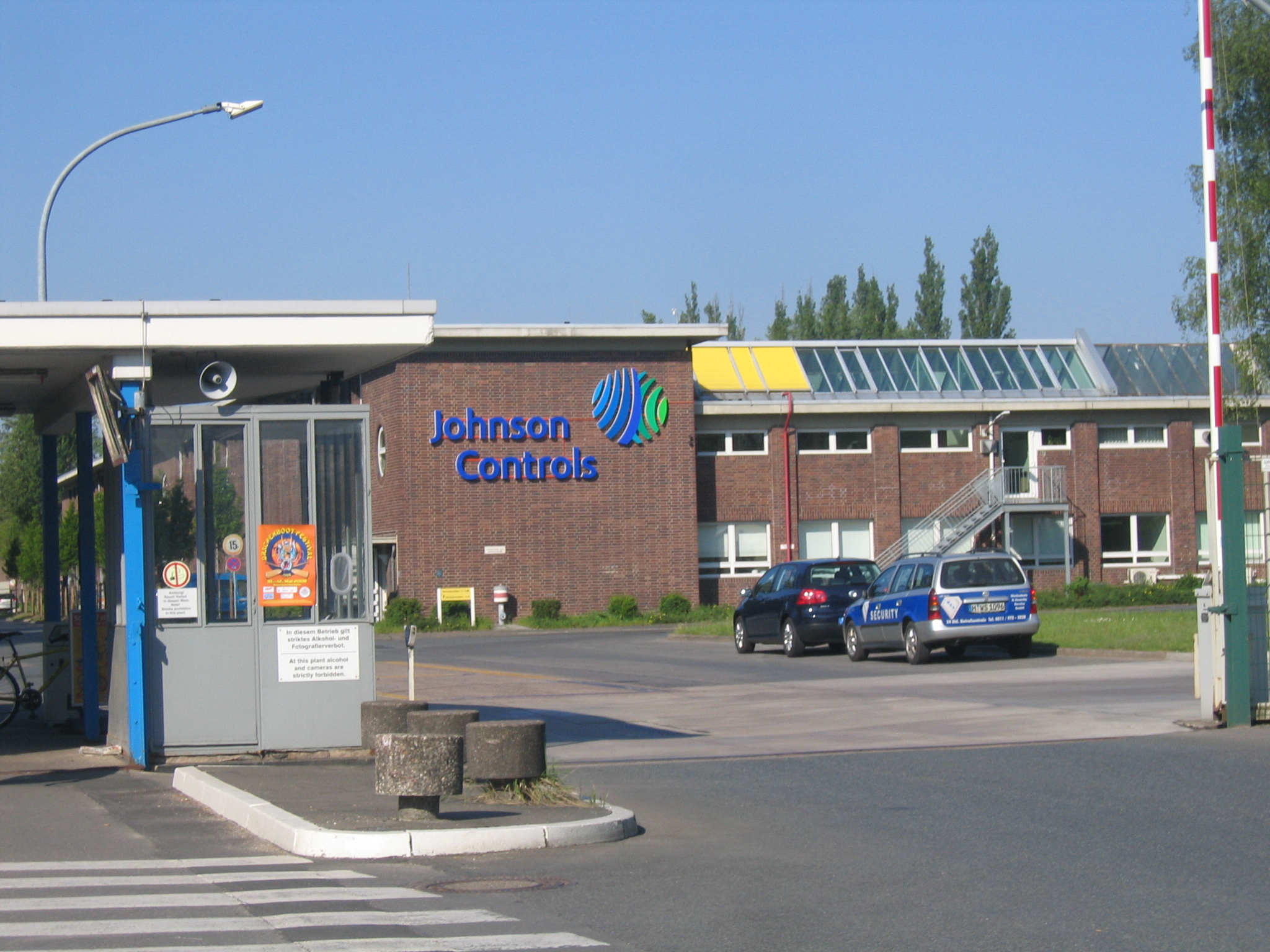 Johnson Controls in Stöcken